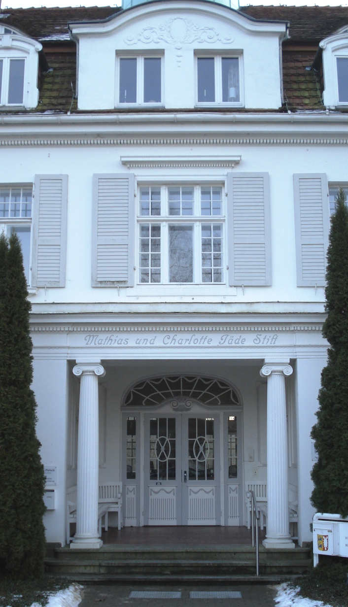 Portal des Mathias und Charlotte Jaede Stiftes